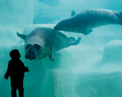 Vision subaquatique du bassin des phoques au Musée de la Mer de Biarritz